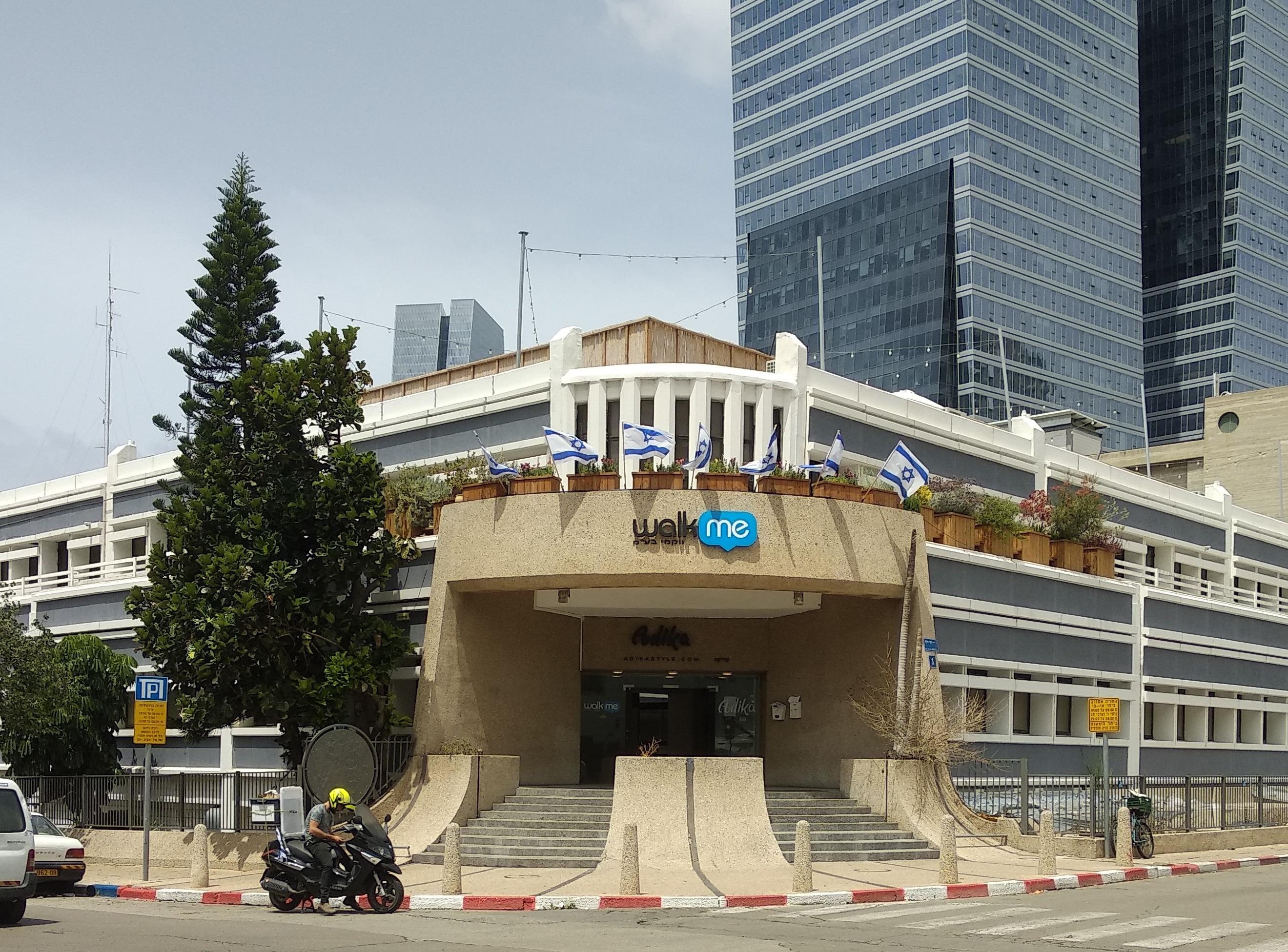 מטה עדיקה בתל אביב